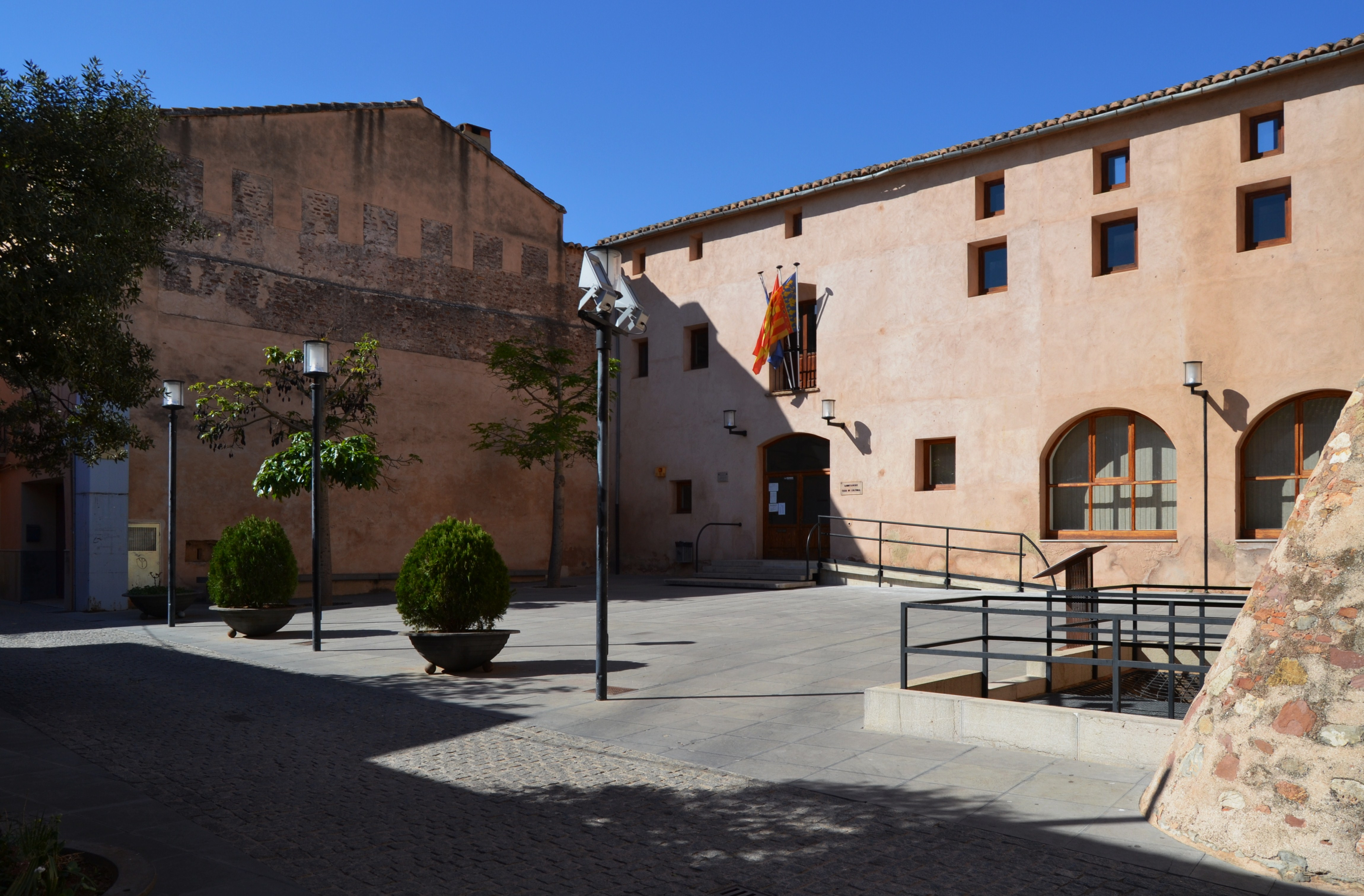 Plaça de l'ajuntament de Benavites.